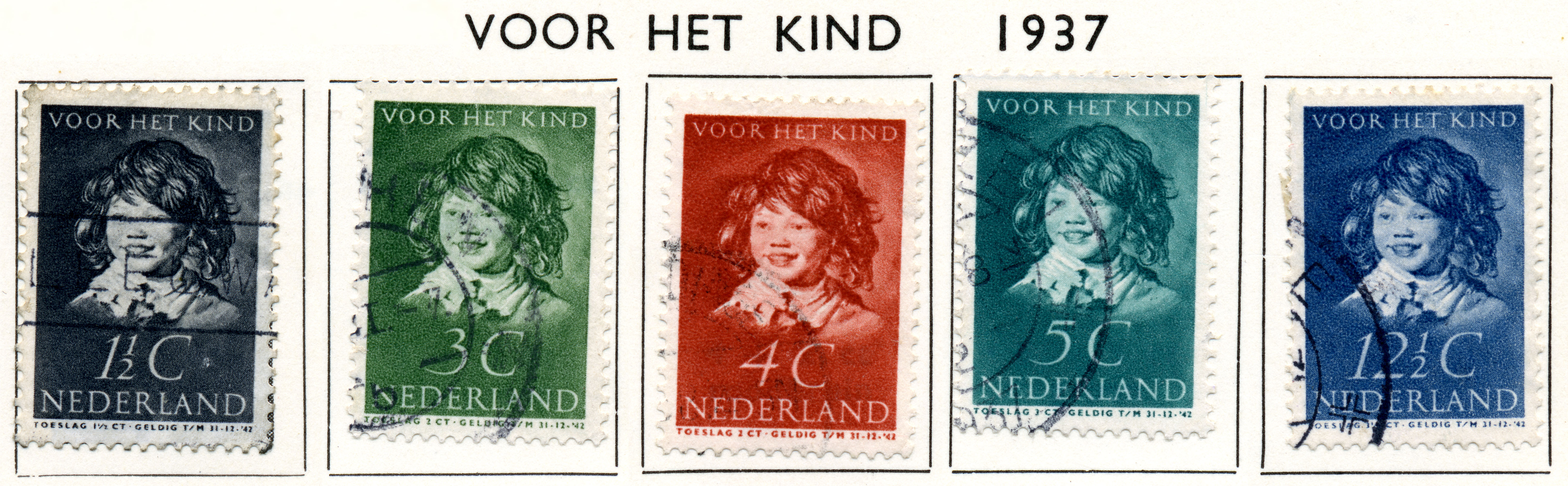 Kinderzegels (1937). Ontwerp door Pyke Koch naar een schilderij van Frans Hals. Letters door Jan van Krimpen.